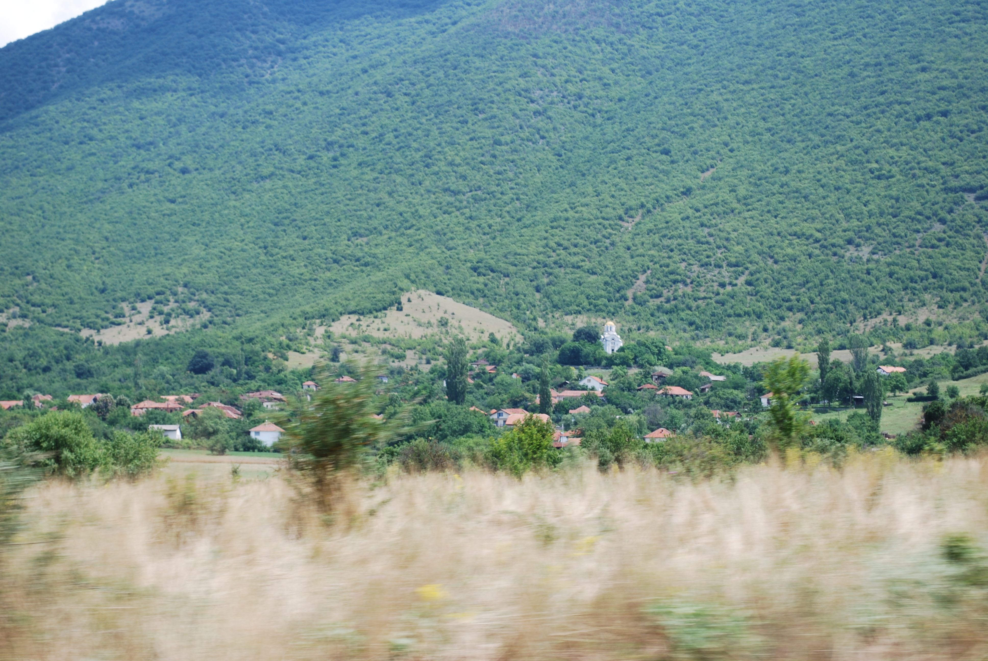 Поглед на тетовска Волковија